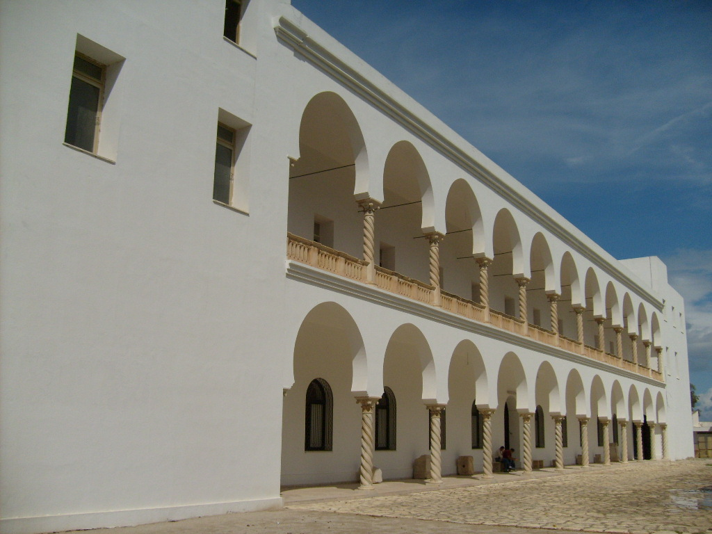 Façade orientale du Musée national de Carthage (Tunisie)